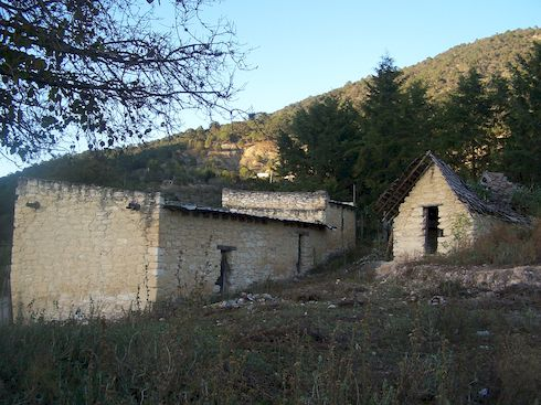 Casa rural en la Laguna de Santa Rosa - Iturbide, Nuevo León, México